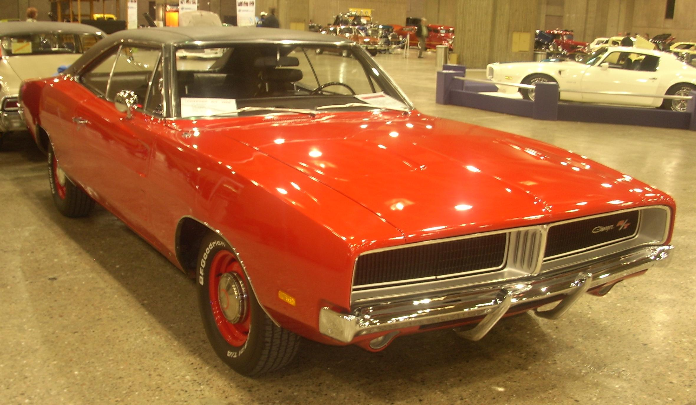 1969 Dodge Charger photographed at Auto classique Montréal 2008.